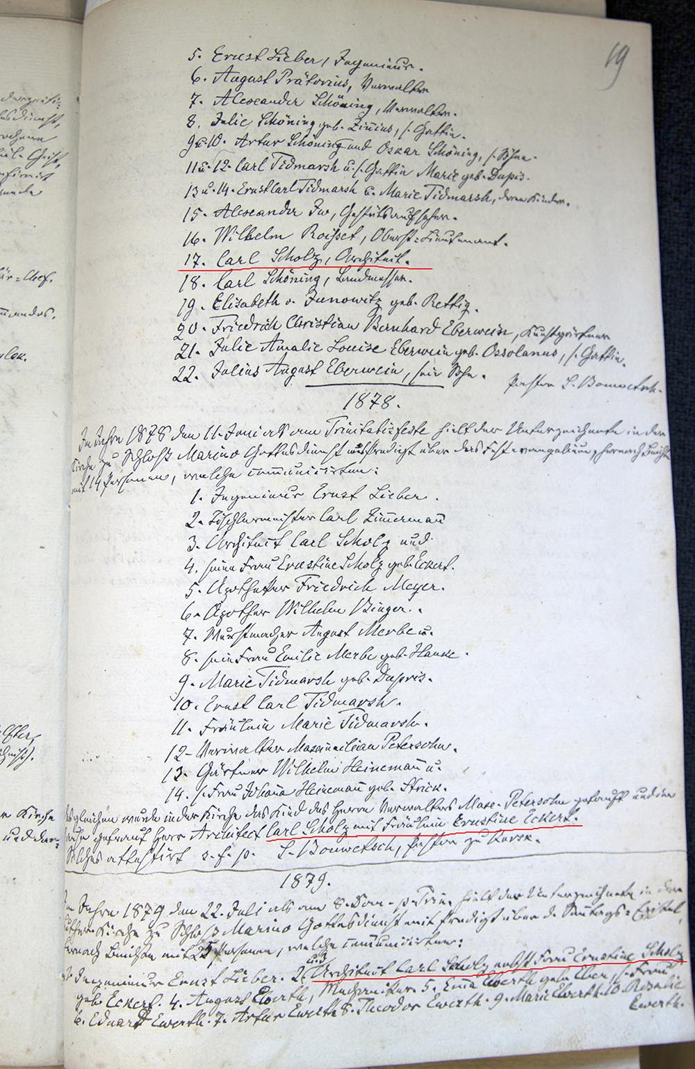 Ивановское Шольц